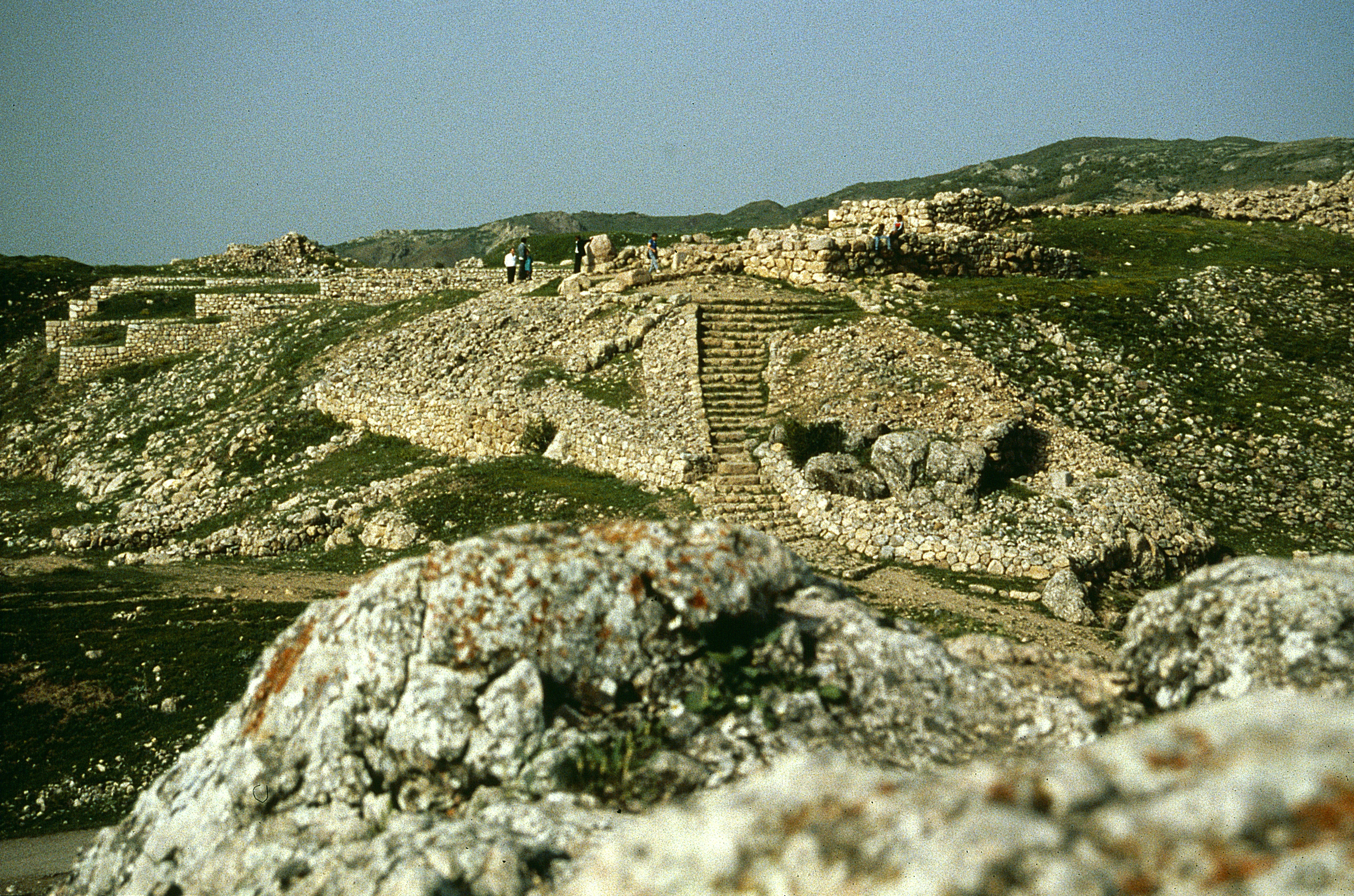 Hattusa: Büyükkale